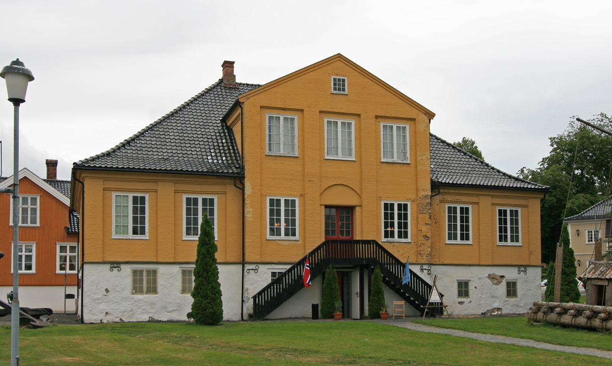 Larvik sjøfartsmuseum (Gamle tollbod), Kirkestredet 5, Larvik. Bygd 1730. Fredet.